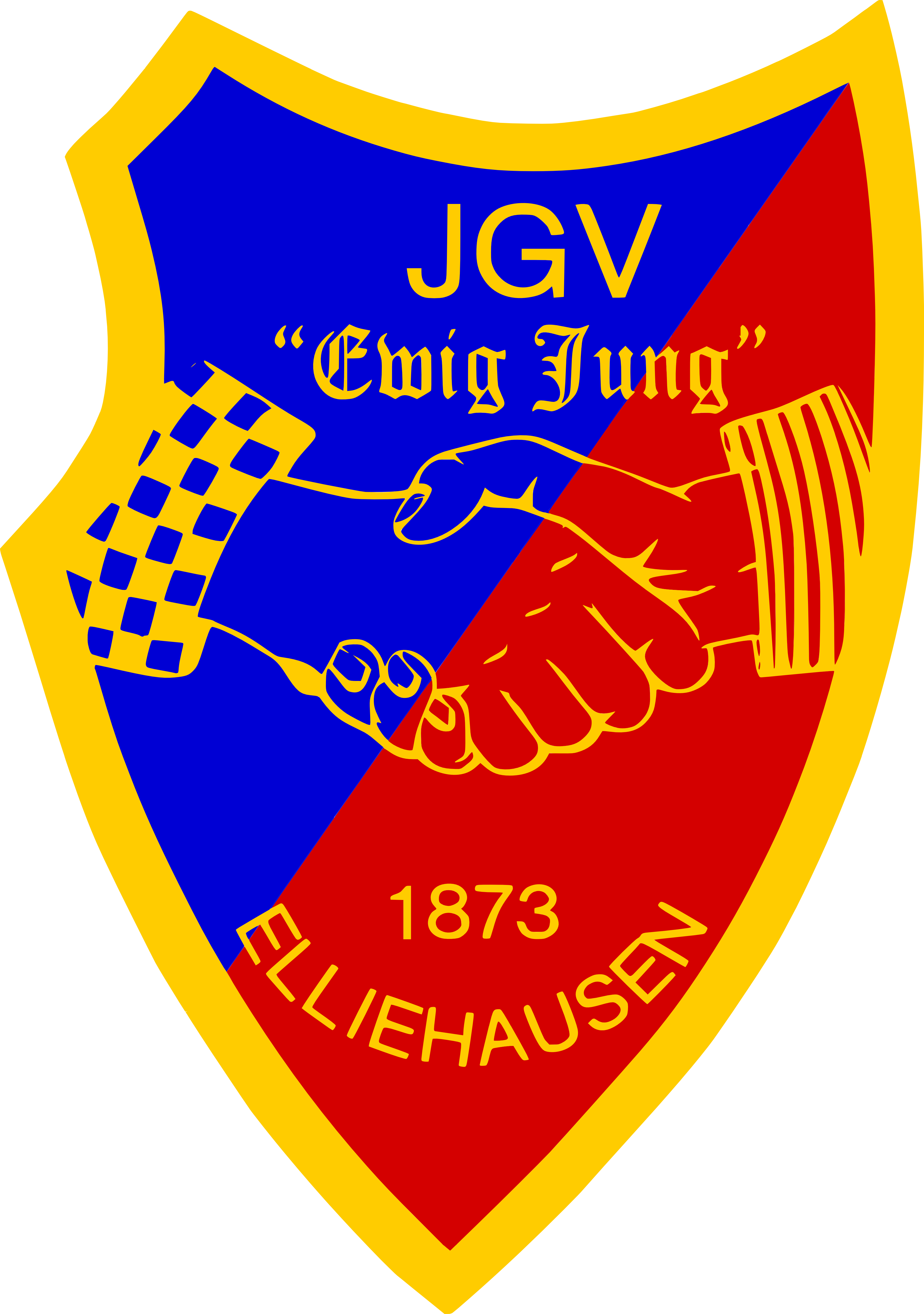 Wappen JGV Ewig Jung Elliehausen